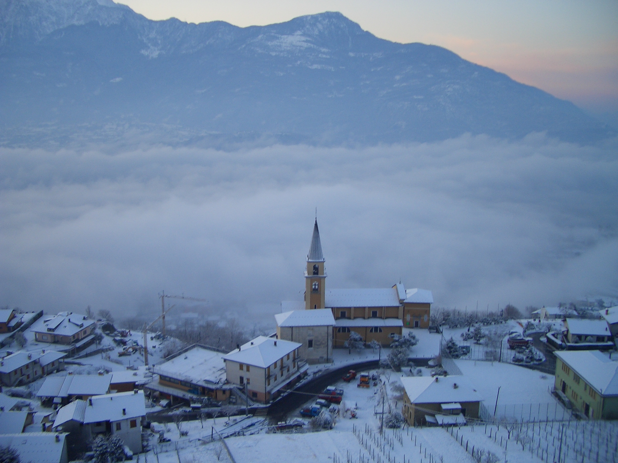 Marco Filla